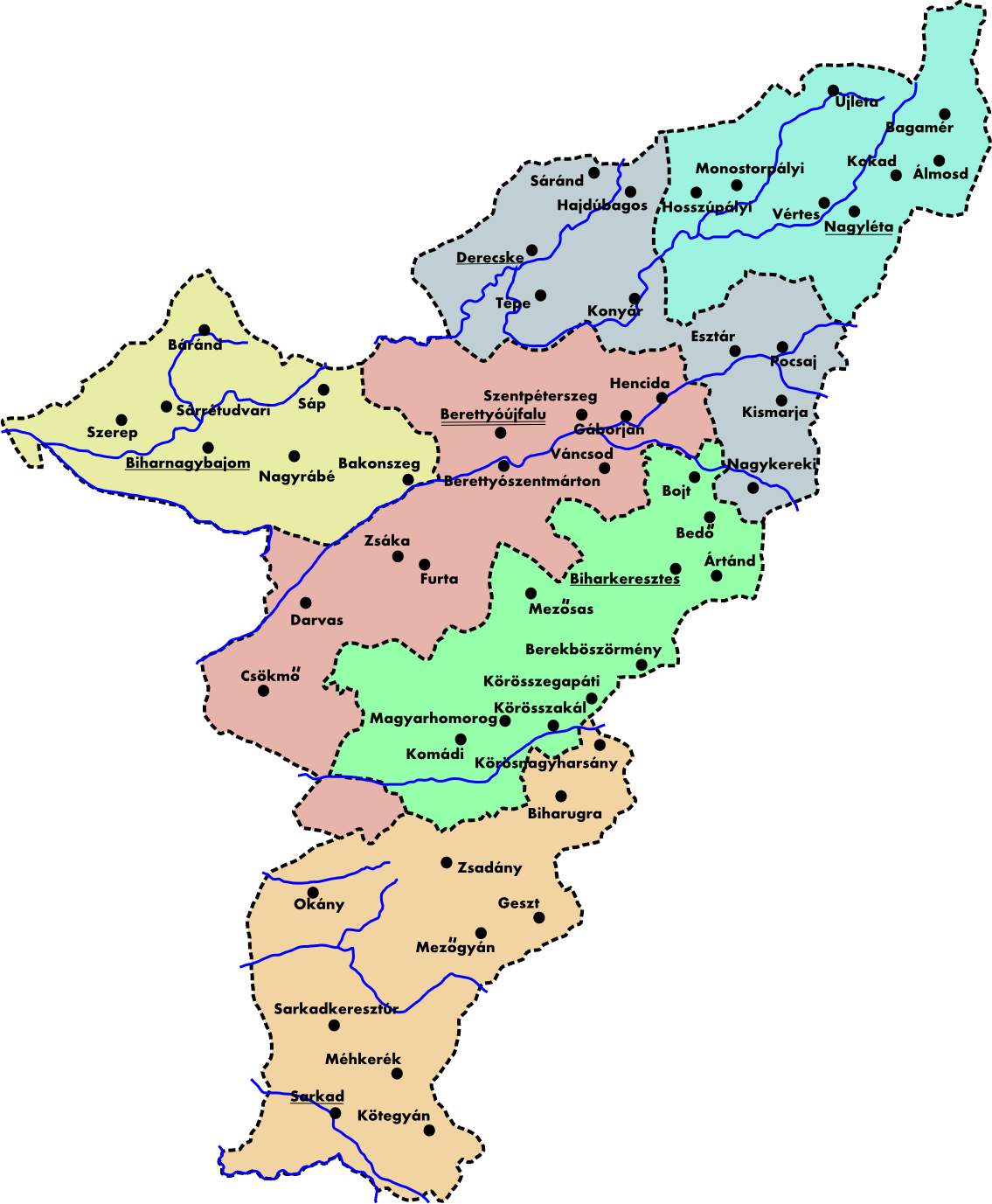 Csonkabihar